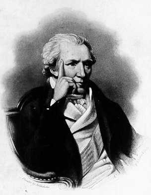 Benjamin Thomson licence